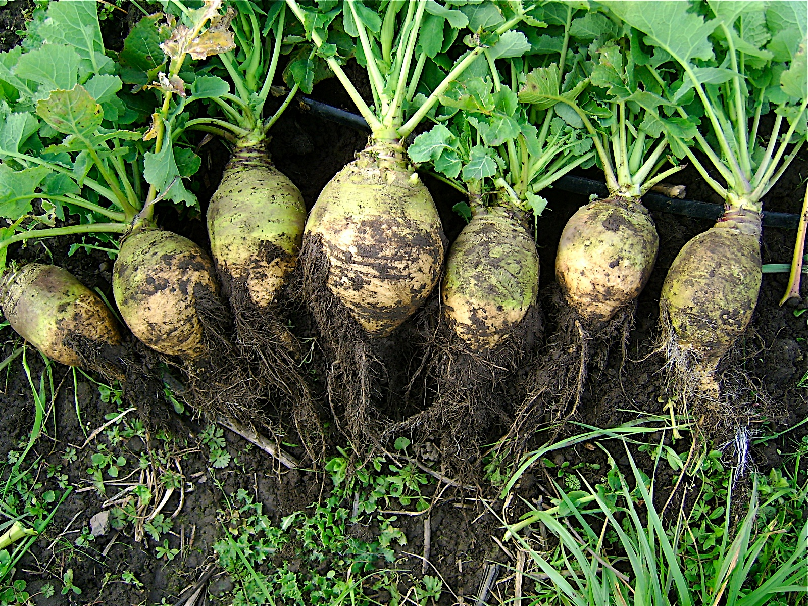 Rutabaga, nadmorska variety